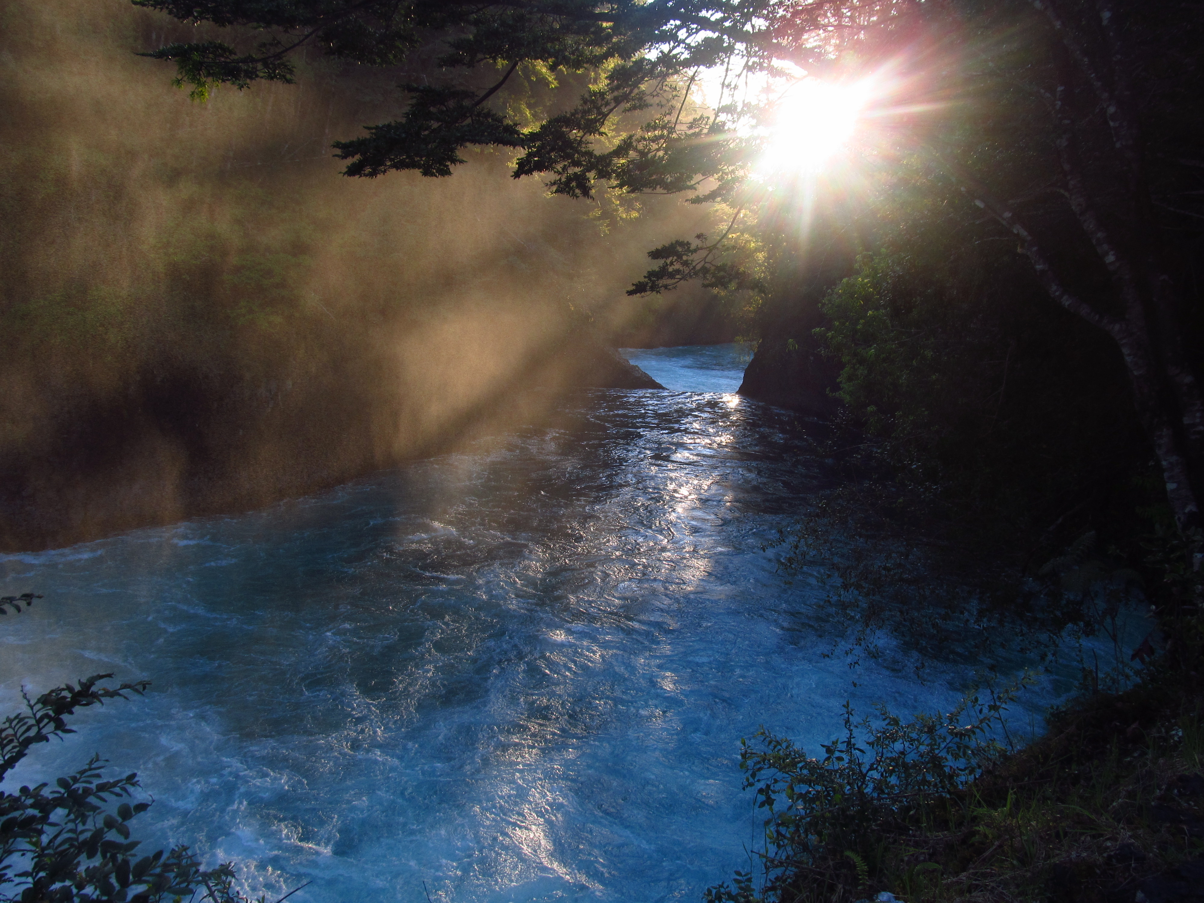 Rio Fuy, Neltume